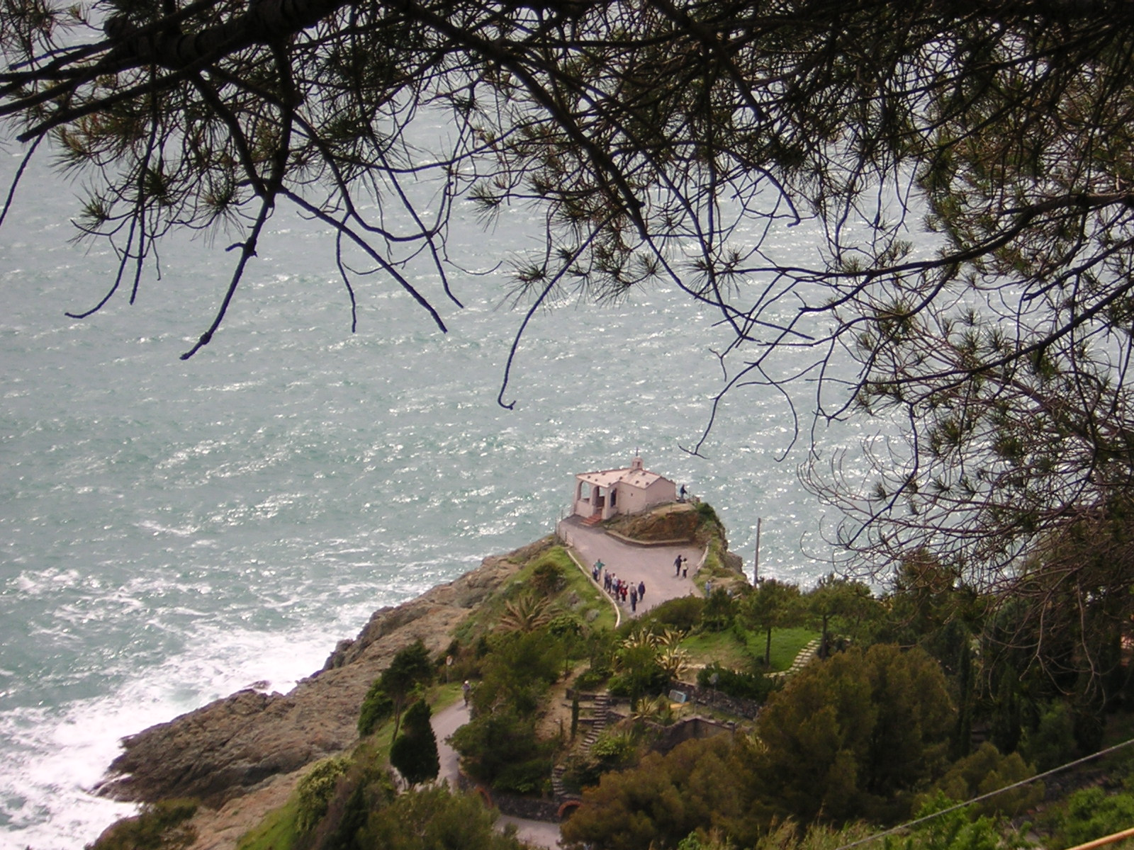 Foto realizzata da Stefano il 15 maggio 2005 a Bonassola.